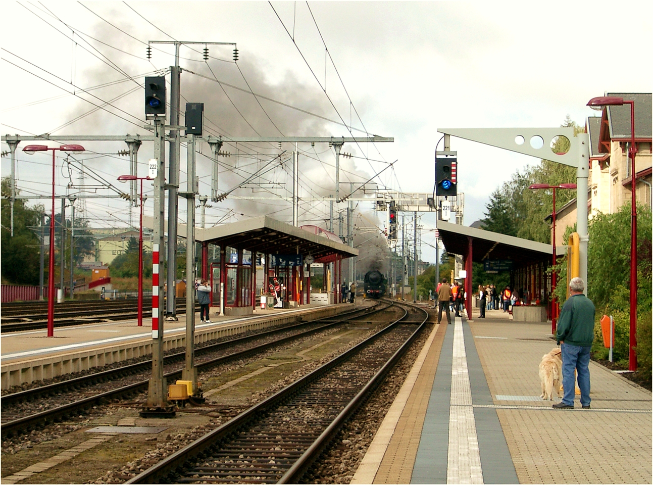 Gare vu Péiteng